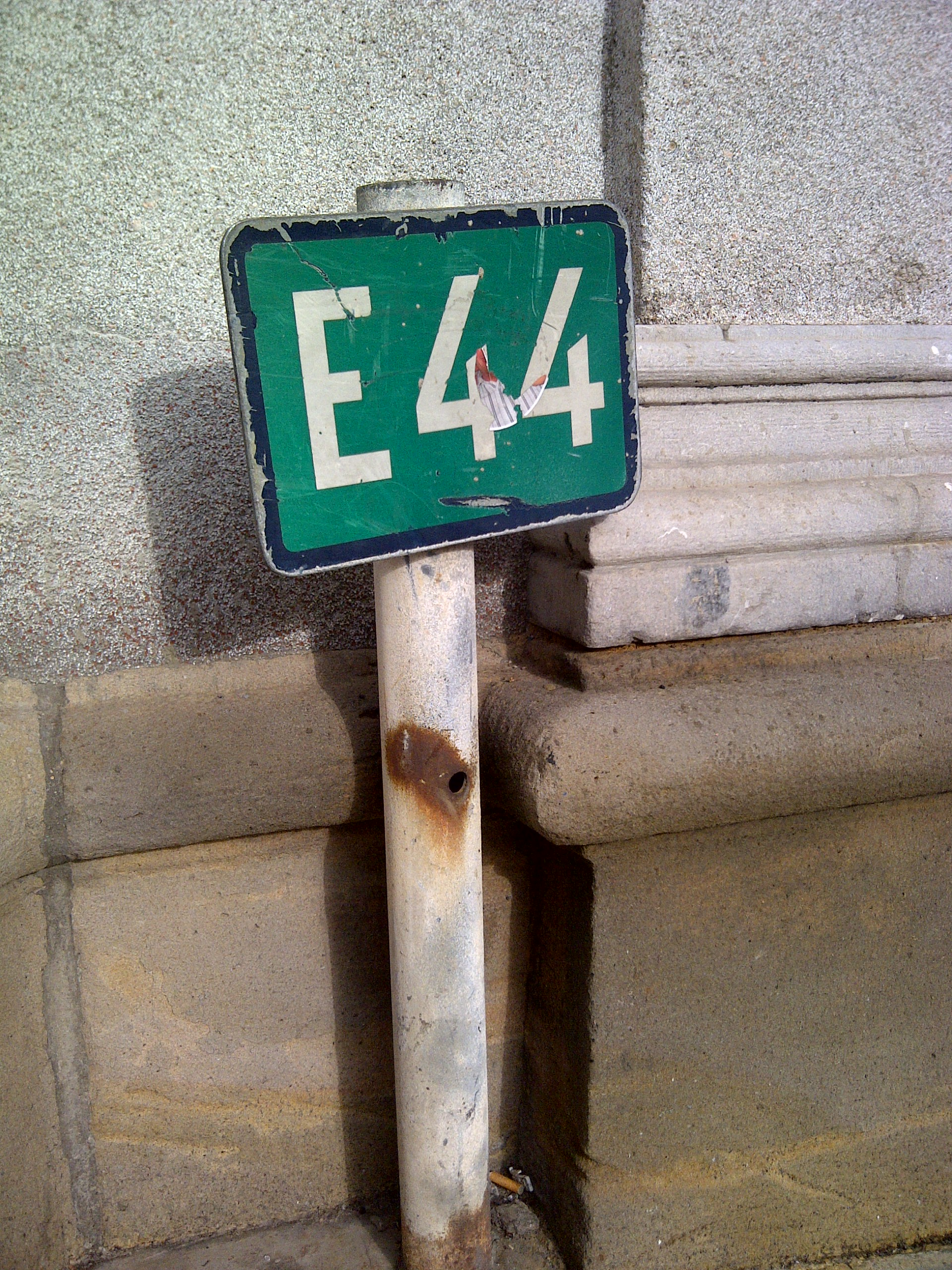 Verkéiersschëld E,21da "Identification - route européenne" aus dem lëtzebuerger Code de la Route